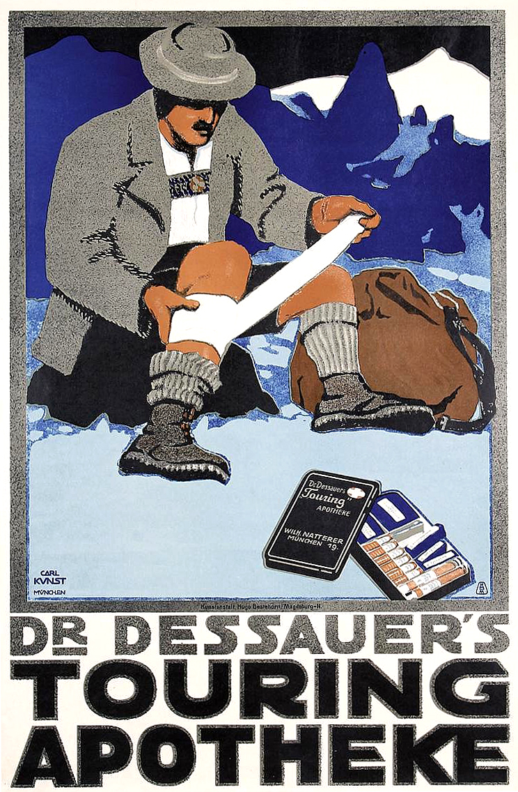 Plaket des Künstlers und Grafikers Carl Kunst mit Werbung für „Dr. Dessauer´s Touring Apotheke“ offensichtlich eine Metalldose mit Verbandsmaterial, mit dem sich ein bayerischer Wanderer in einer stilisierten Alpen-Landschaft hier wohl eine Wunde an der Wade umwickelt. Das lithografierte Werbeplakat im Format circa 76 x 50 cm wurde von der Druckerei Hugo Bestehorn in Magdeburg gedruckt und trägt in der rechten unteren Bildecke noch einen weiteren, hier noch nicht identifizierten Hinweis ...